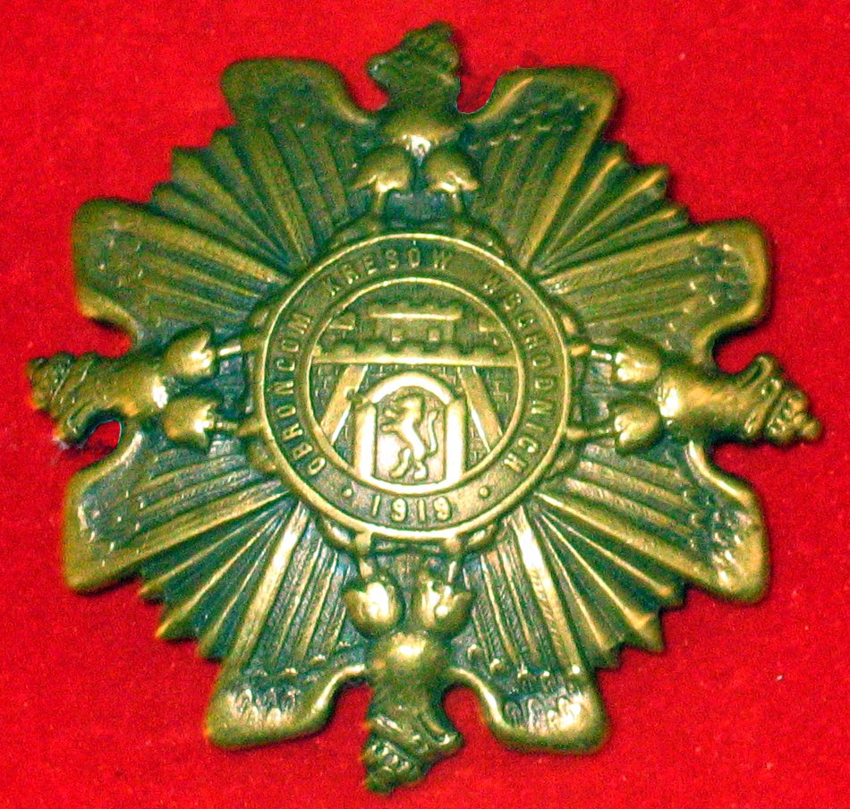 Odnaka Honorowa "Orlęta"